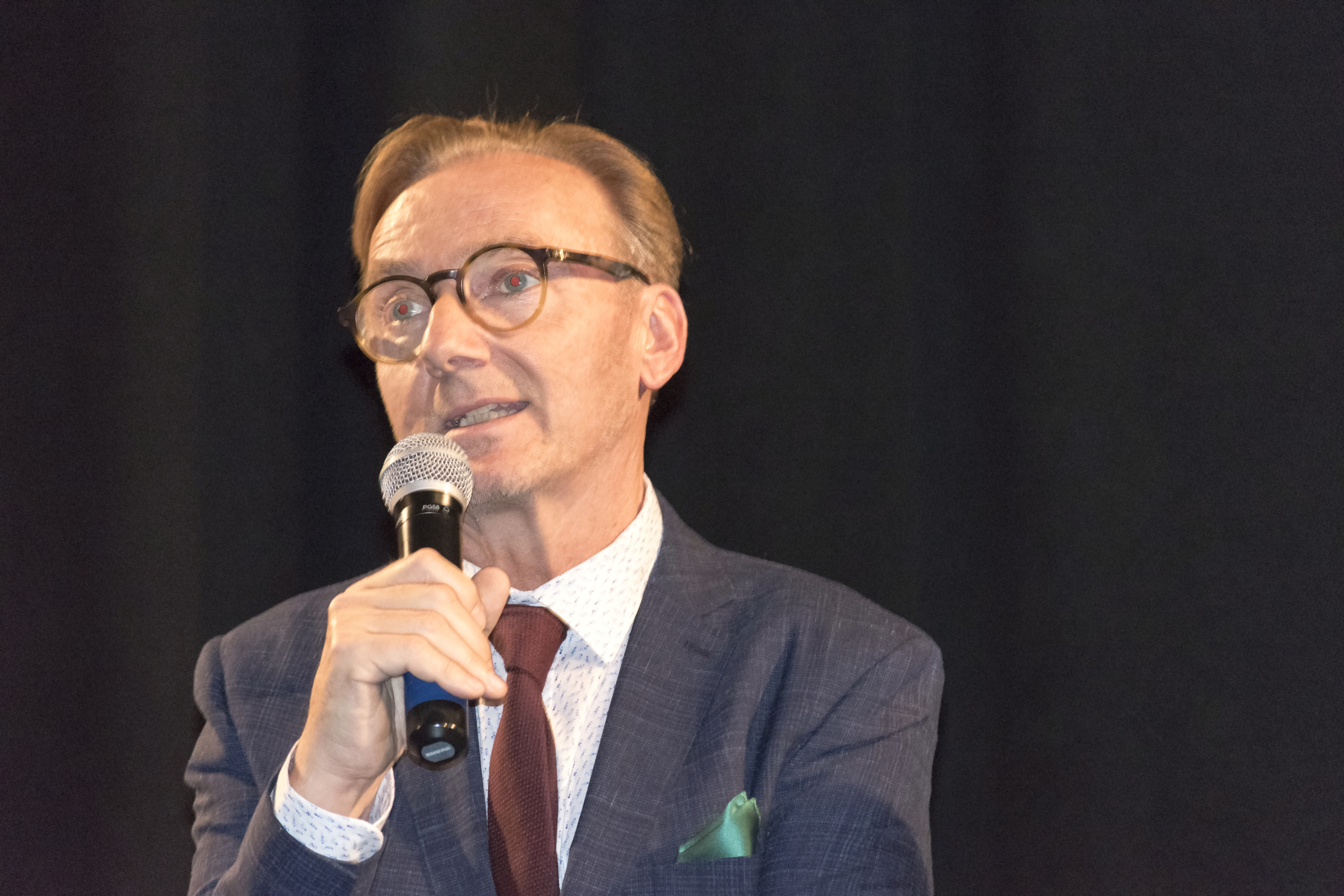 Fotky z novinářské projekce 18. 4. 2018 Autor: Blanka Borová (Karolína Černá) pro Kritiky.cz